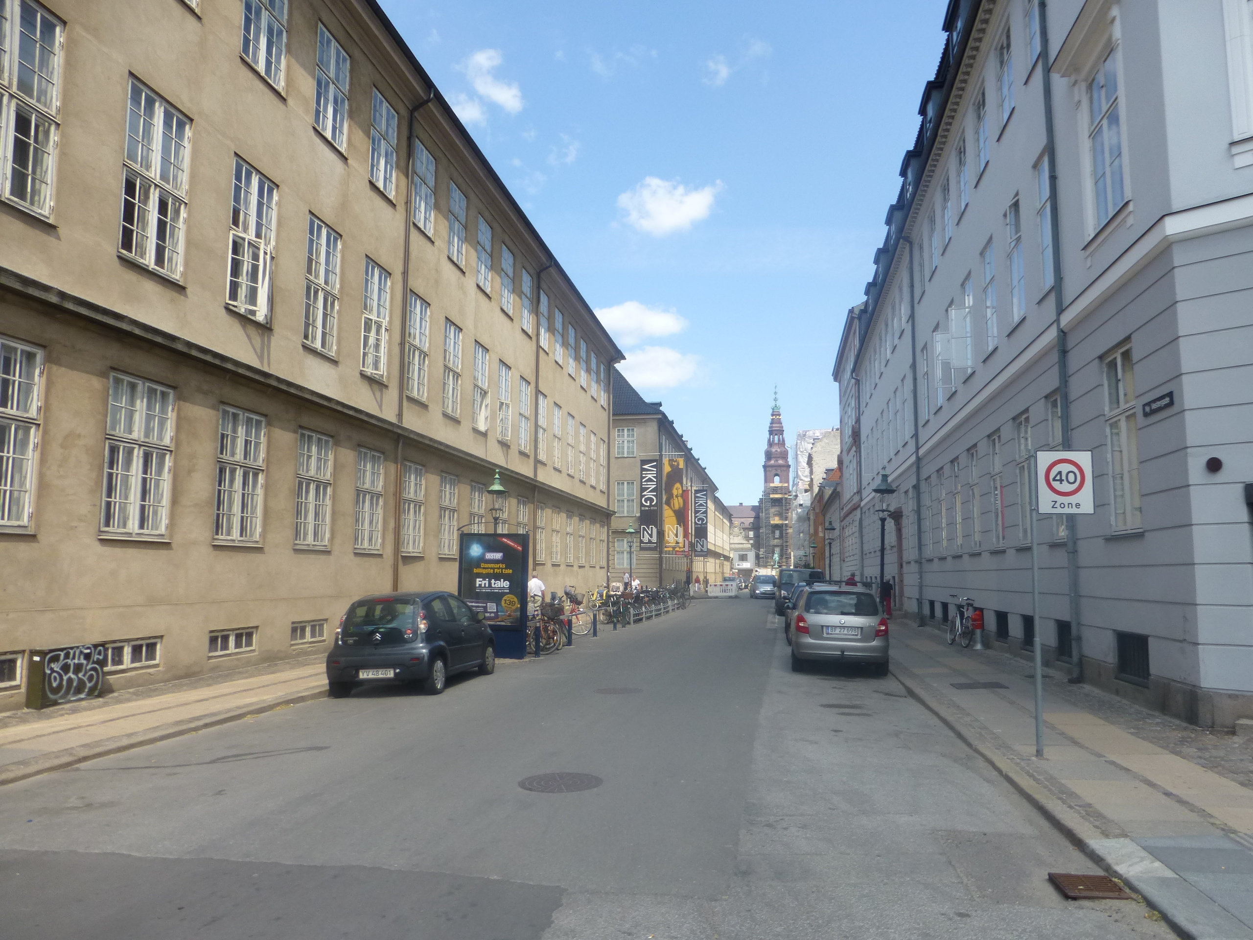 The street Ny Vestergade in Indre By in Copenhagen.